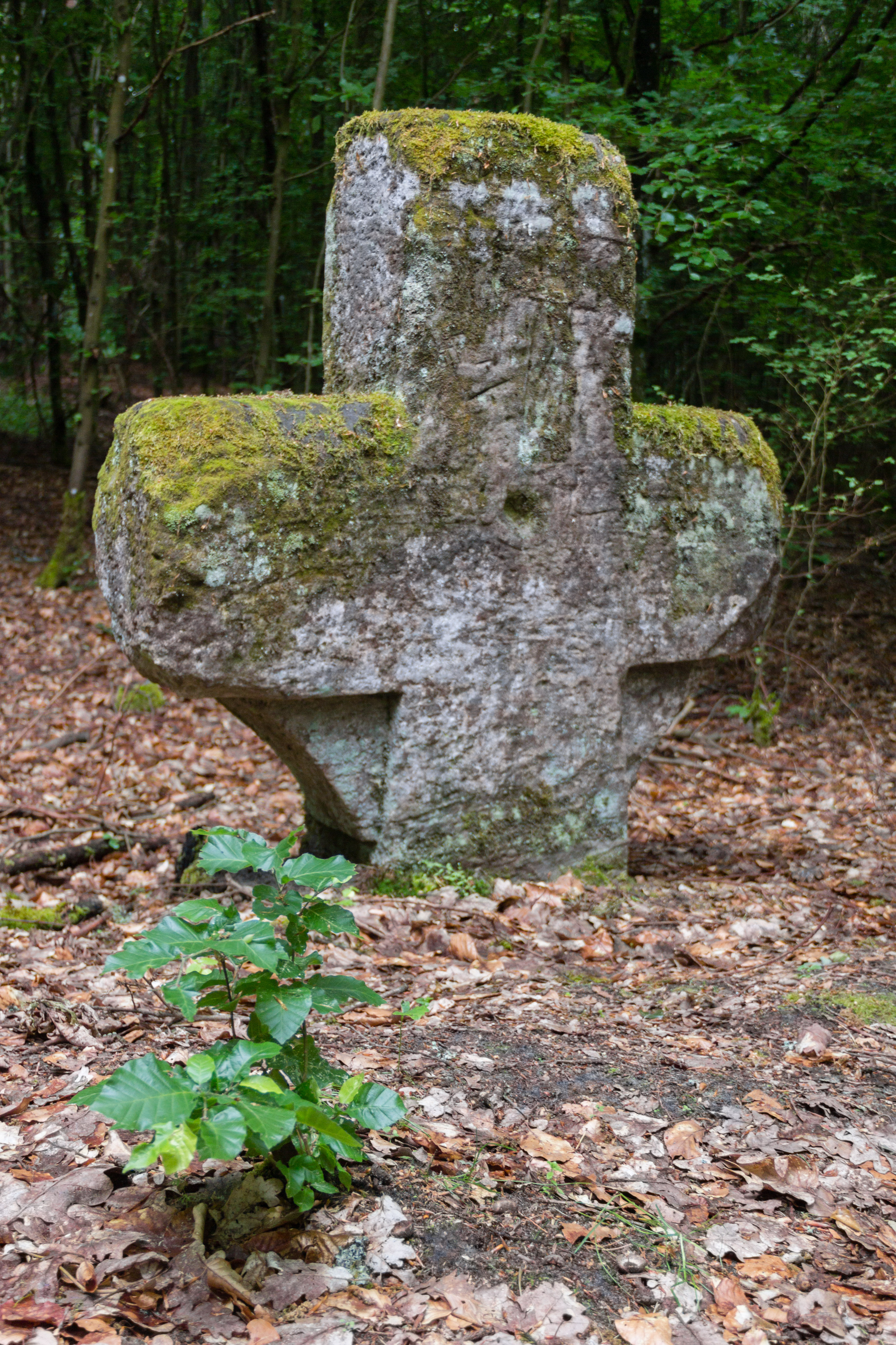 Steinkreuz, Zimmermannskreuz, Winkelhaid, Rückansicht